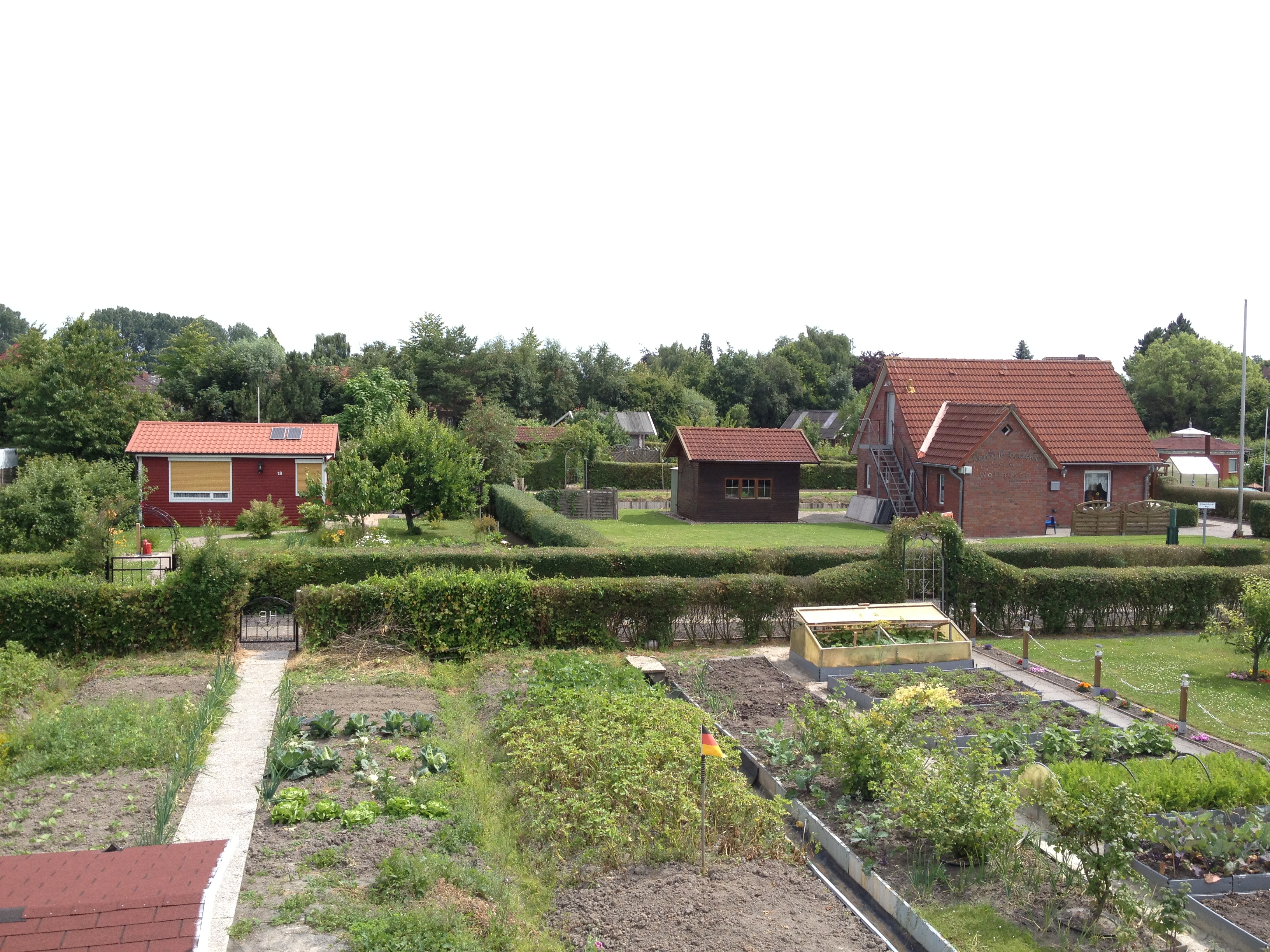 Teilansicht Kleingartenbauvereins Wolthusen an der Howerdastraße in Emden. Rechts im Bild ist das Vereinsheim zu sehen.